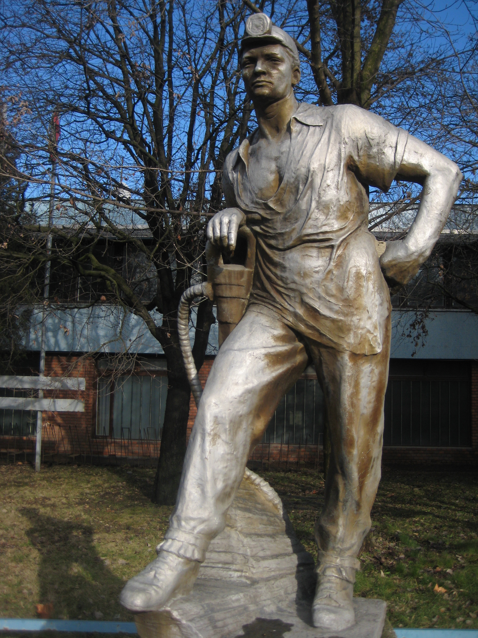 Pihenő bányász szobra Dorogon, Rákóczi út